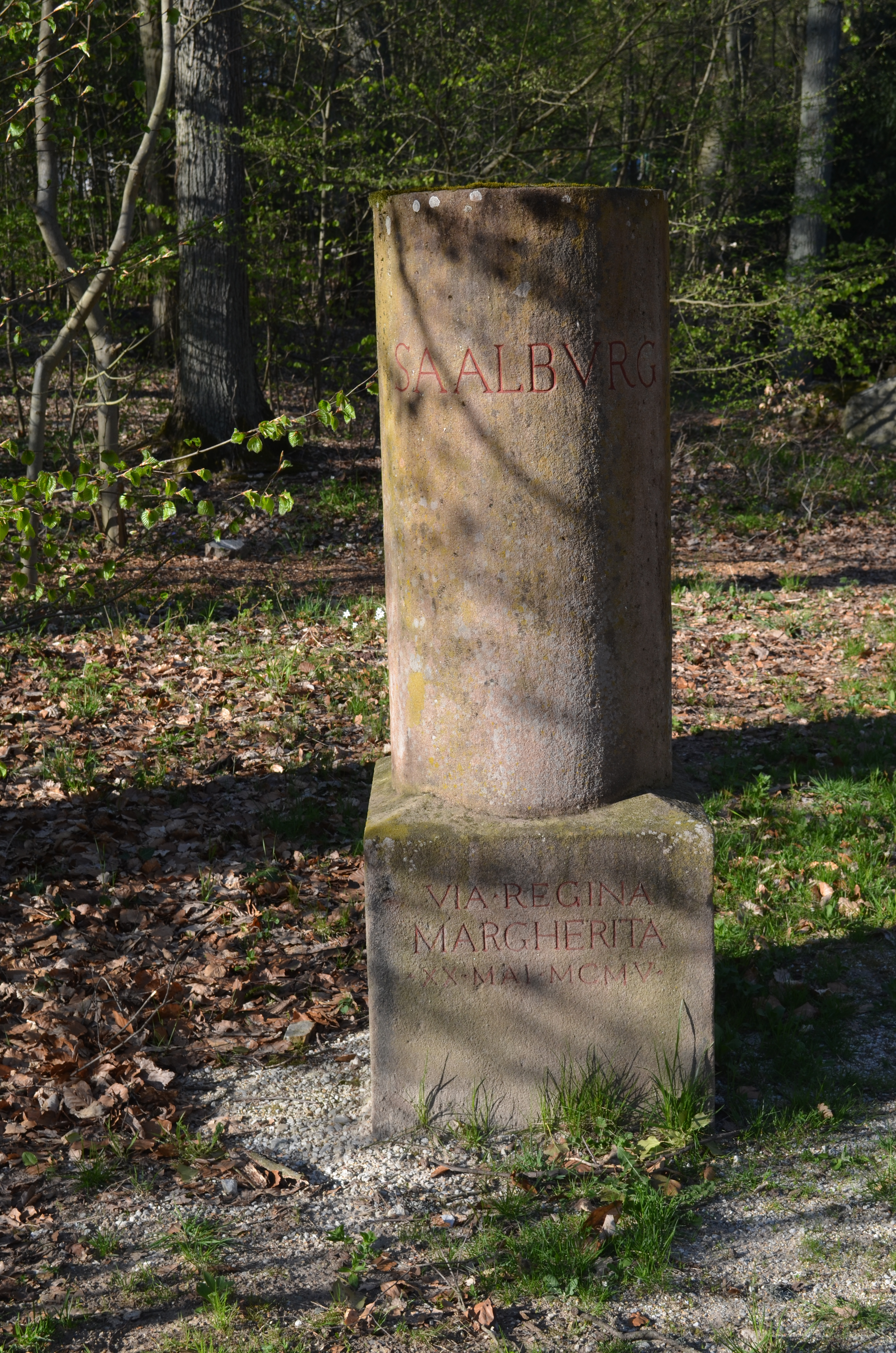 Bad Homburg, Saalburg, Margheriten-Stein